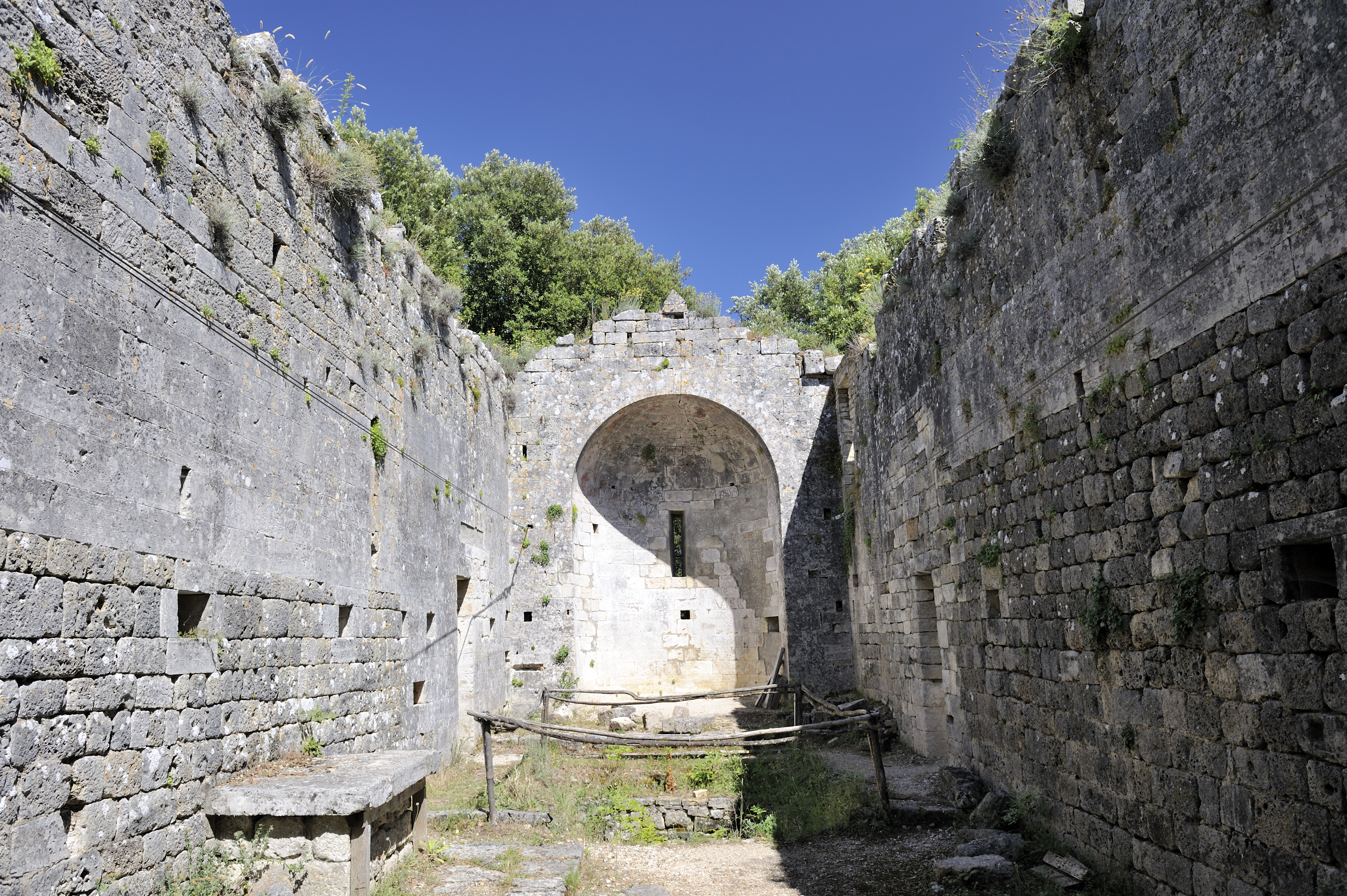 interno della chiesa dei Santi Frediano e Giovanni a Castelvecchio di San Gimignano - Siena